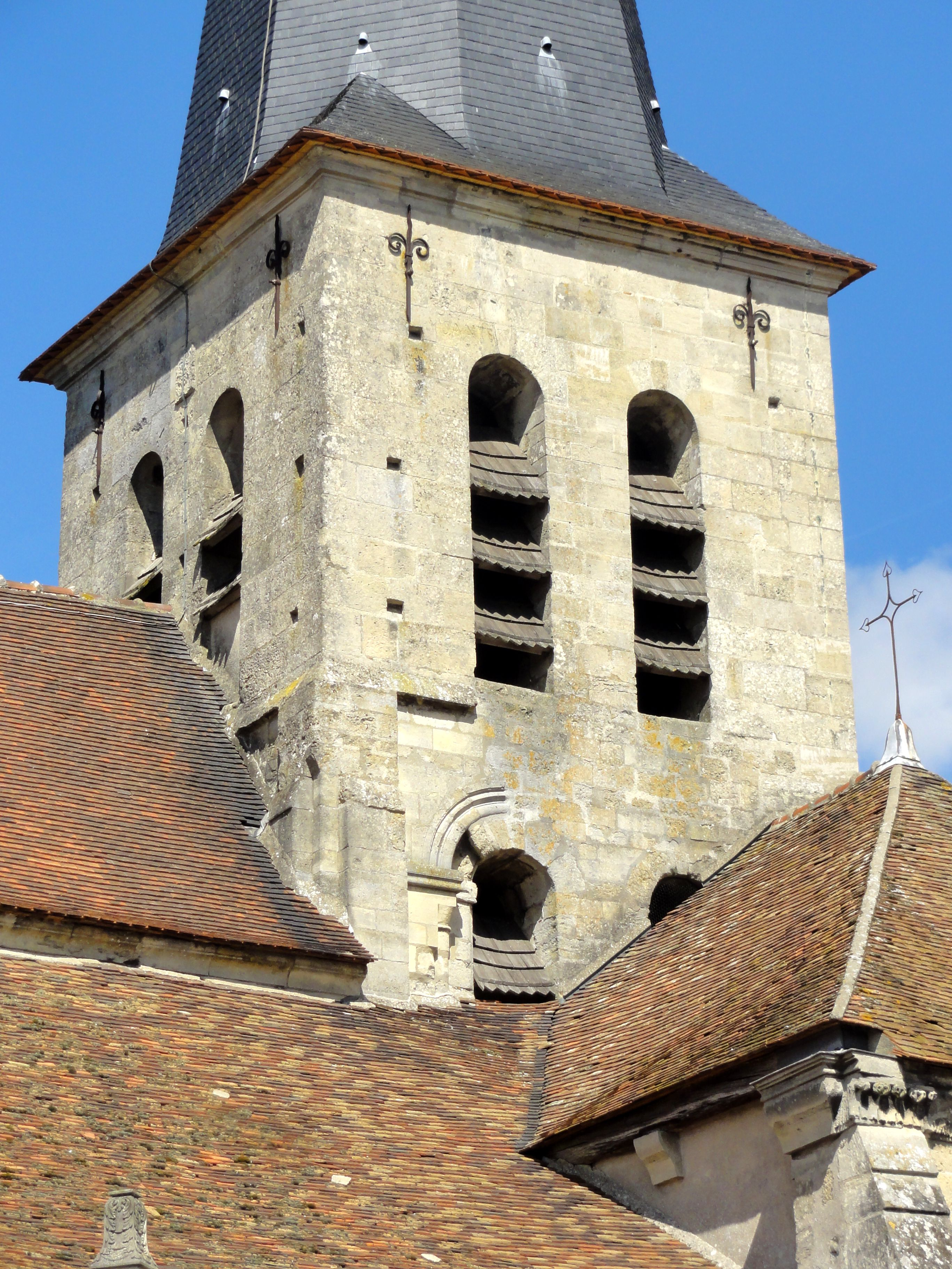 Clocher.